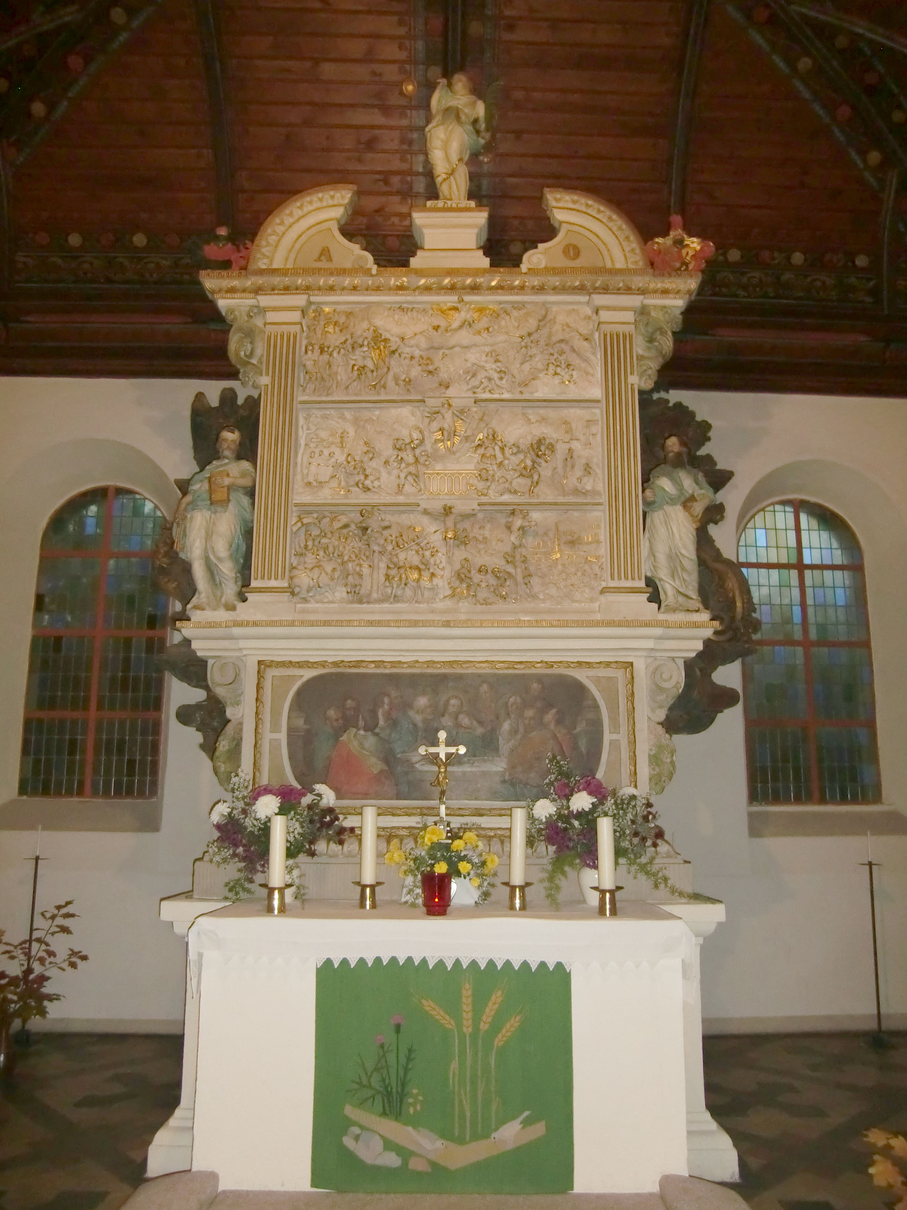 Kirche Klix, Altar, Sandstein. Abendmahlbild, Öl auf Stein. Reliefs um 1580 Hornjoserbsce: Wołtar w Klukšanskej cyrkwi